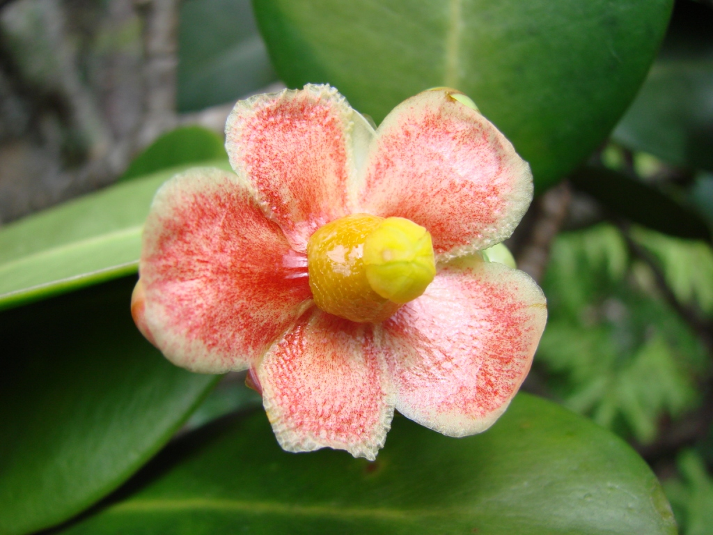 Clusia weddelliana - CLUSIACEAE Parque Estadual da Serra dos Pirineus - Pirenópolis - Goiás - Brasil.